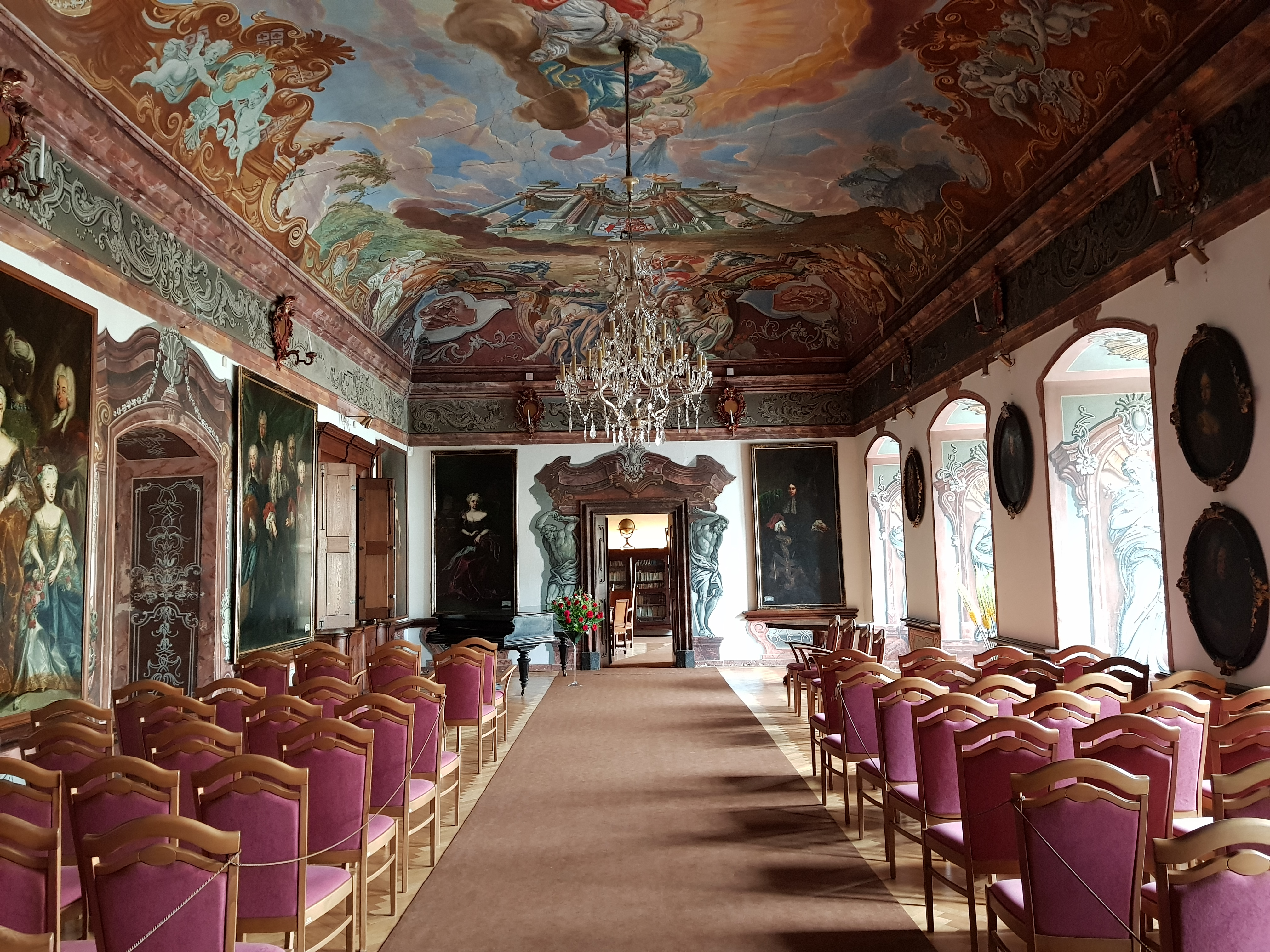 Interiéry zámku Manětín